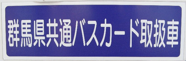 群馬県共通バスカード「ぐんネット」が使用できるバス車両に付されるステッカー。バス入り口付近に貼られる。